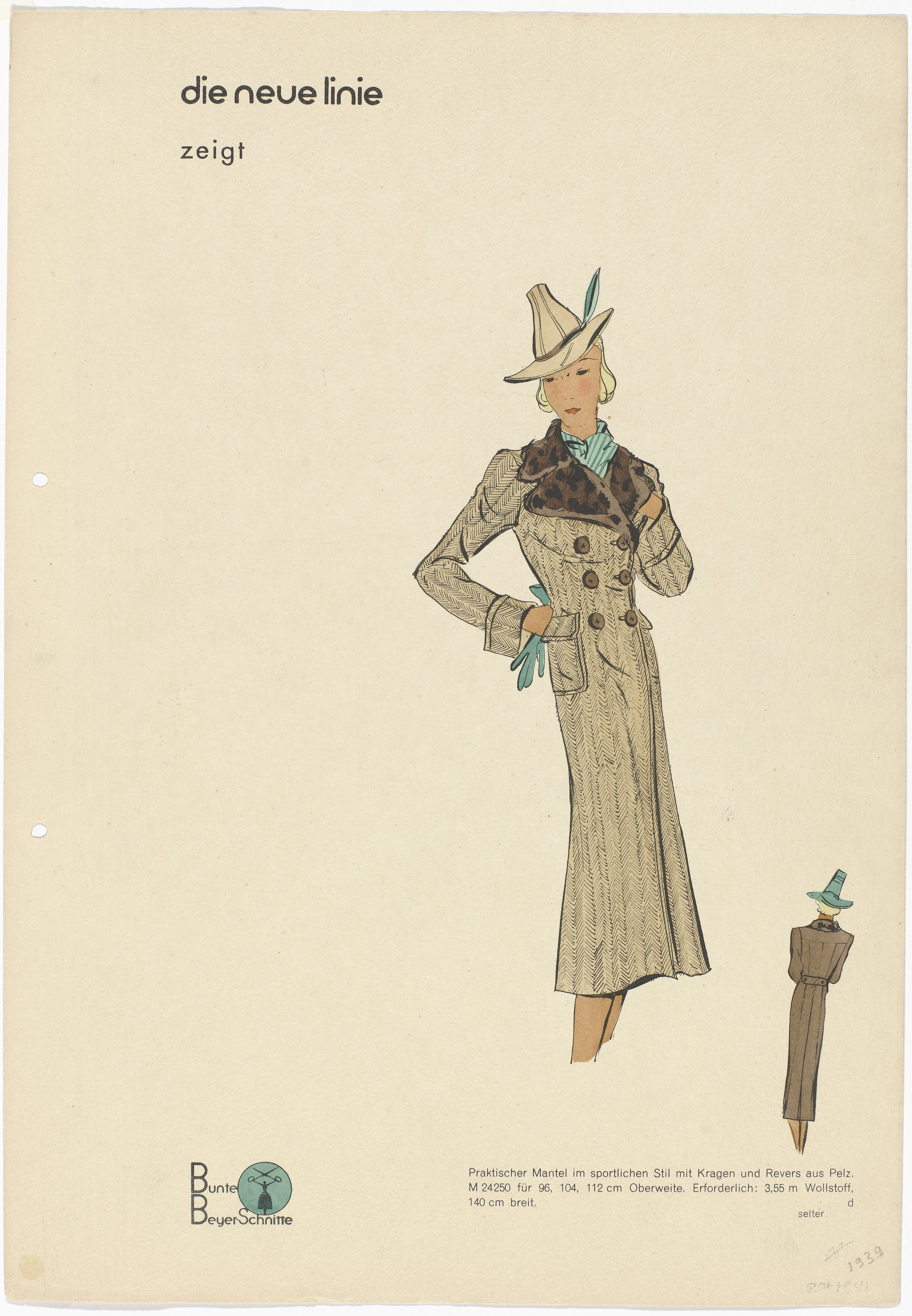 IdentificatieTitel(s): Bunte Beyer-Schnitte, die neue linie, 1939 : Praktischer Mantel (...) (titel op object)Objecttype: modeprent Objectnummer: RP-P-2009-2809Omschrijving: Damesmantel 1939VervaardigingVervaardiger: prentmaker: anoniemDatering: ca. 1939Fysieke kenmerken: gravureMateriaal: papier Techniek: graveren (drukprocedé) / met de hand kleurenAfmetingen: blad: h 395 mm × b 275 mmOnderwerpWat: coat (+ women's clothes)head-gear: hat (+ women's clothes)fashion platesWanneer: 1939 - 1939Verwerving en rechtenCredit line: Bruikleen van de Collectie M.A. Ghering-van IerlantVerwerving: bruikleen 4-dec-2014Copyright: Publiek domein